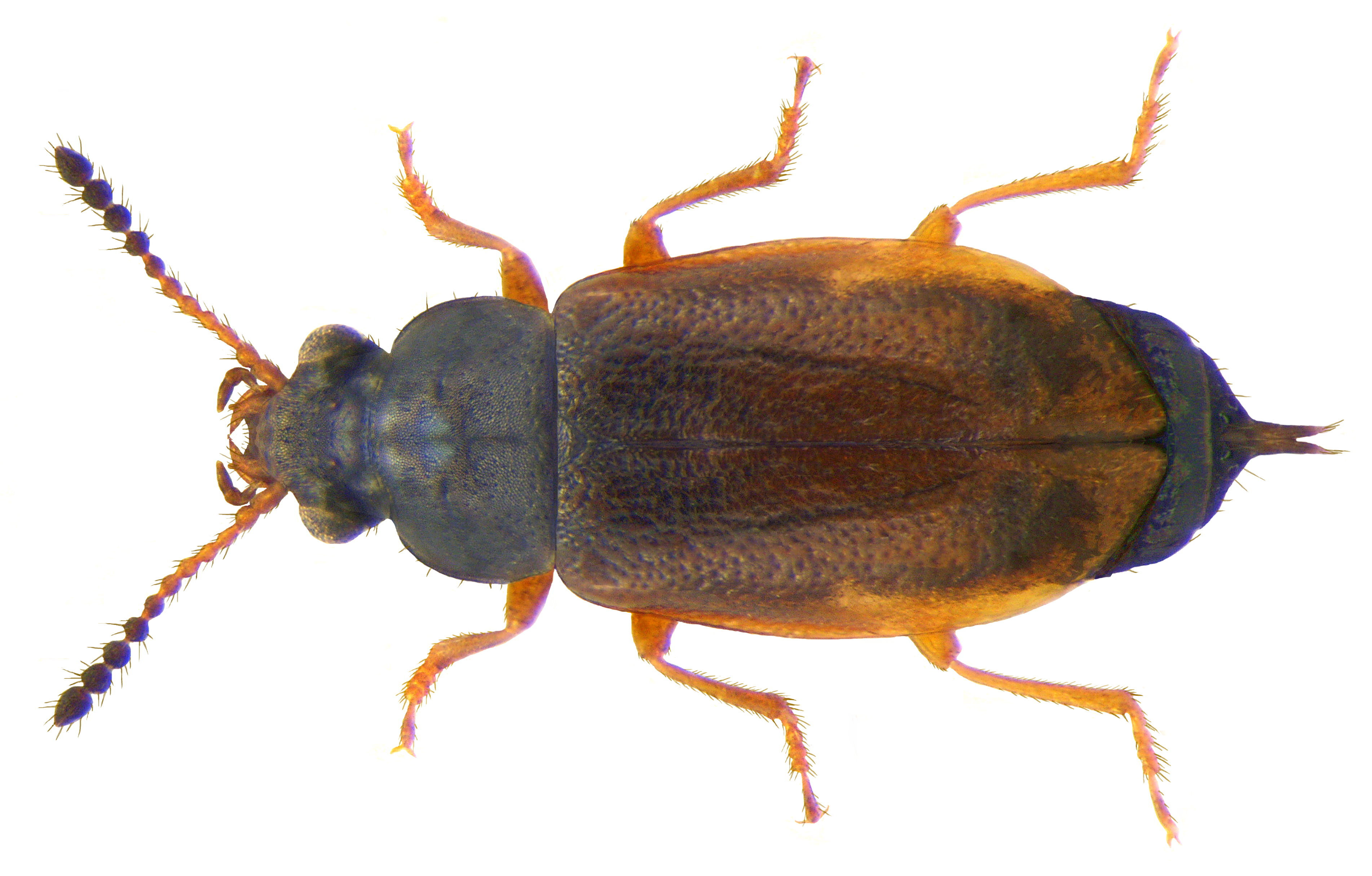 Familie: Staphylinidae Groesse: 2,5-3 mm Verbreitung: in den Gebirgen von Europa Fundort: Helvetia, Graubünden, Ilanz, Laax, 1900 m leg.det. U.Schmidt, 2004 Photo: U.Schmidt, 2009